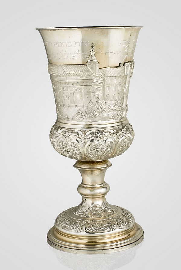 Den Kelch erhielt Pfarrer Michel Lang als Geschenk von der Israelitischen Kultusgemeinde nach dem Donauhochwasser von 1838 in Pest